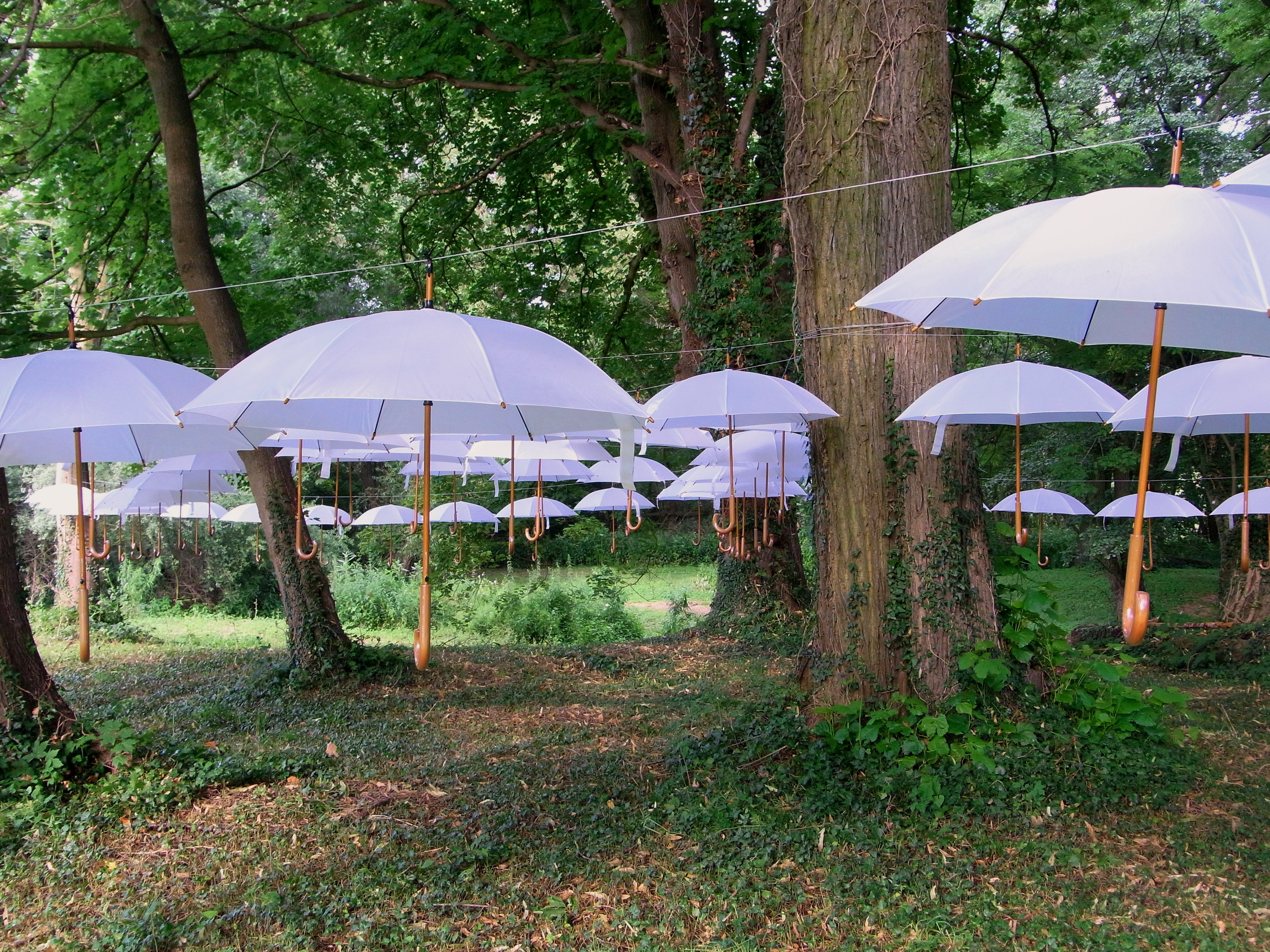 In der Freiluft-Kunstausstellung Verformungen vom 13. Juli bis 15. August 2017 in der historischen Gartenanlage des Edelhofs Ricklingen (Am Edelhofe) in Hannover ist die von einer Jury um die hannoversche Kuratorin Dagmar Brand ausgewählte Arbeit der Künstler-Duos Minou Davar und Norbert Schittek unter dem Titel „La Danse des Flaneuses“ zu sehen ...